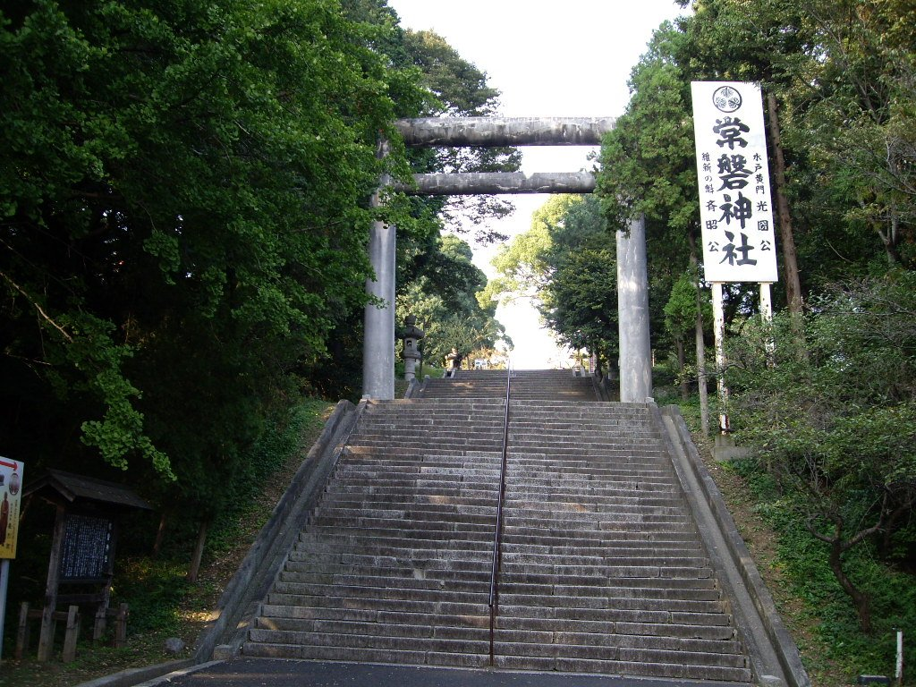 Tokiwa Jinja Torii; 常磐神社の大鳥居